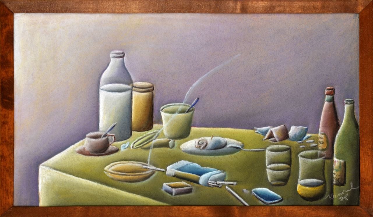 23. Bohumír Komínek, Opilcovo ranní zátiší I, pastel (1978)